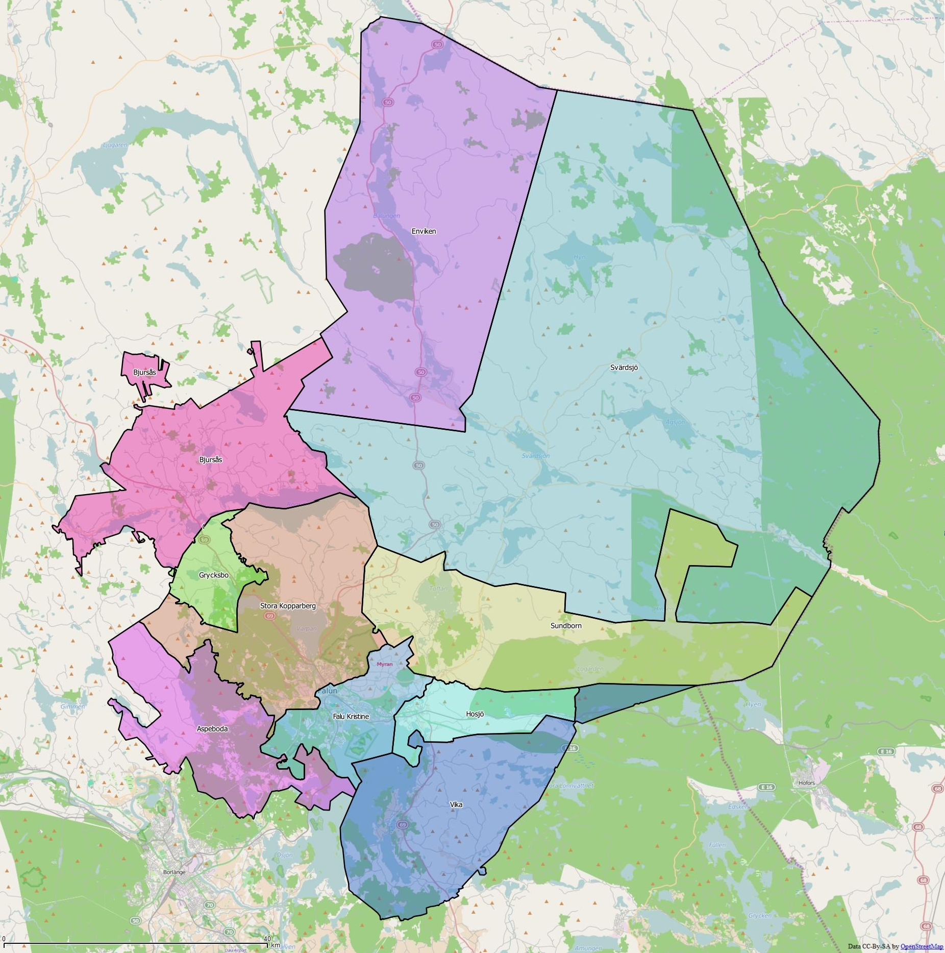 Distriktsindelningen i Falu kommun